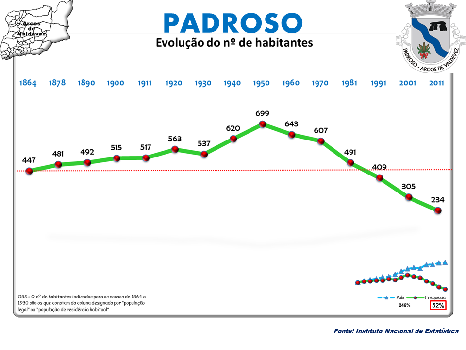 Censos 1864/2011